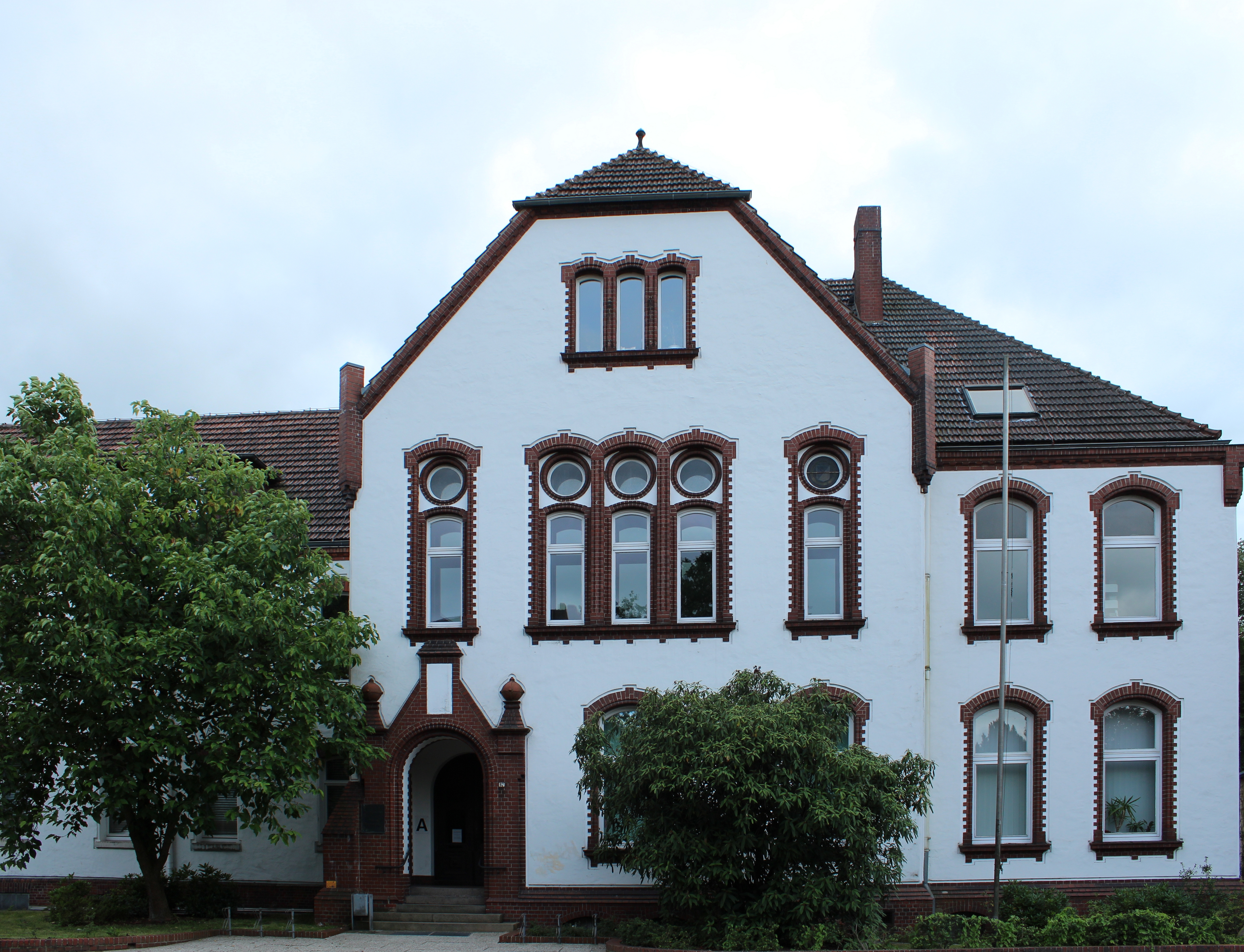 Hauptgebäude des Amtsgerichts Bremen-Blumenthal, 2011. Das abgebildete Objekt ist ein geschütztes Kulturdenkmal in der Freien Hansestadt Bremen, mit der Nr. 2051 beim Landesamt für Denkmalpflege registriert.